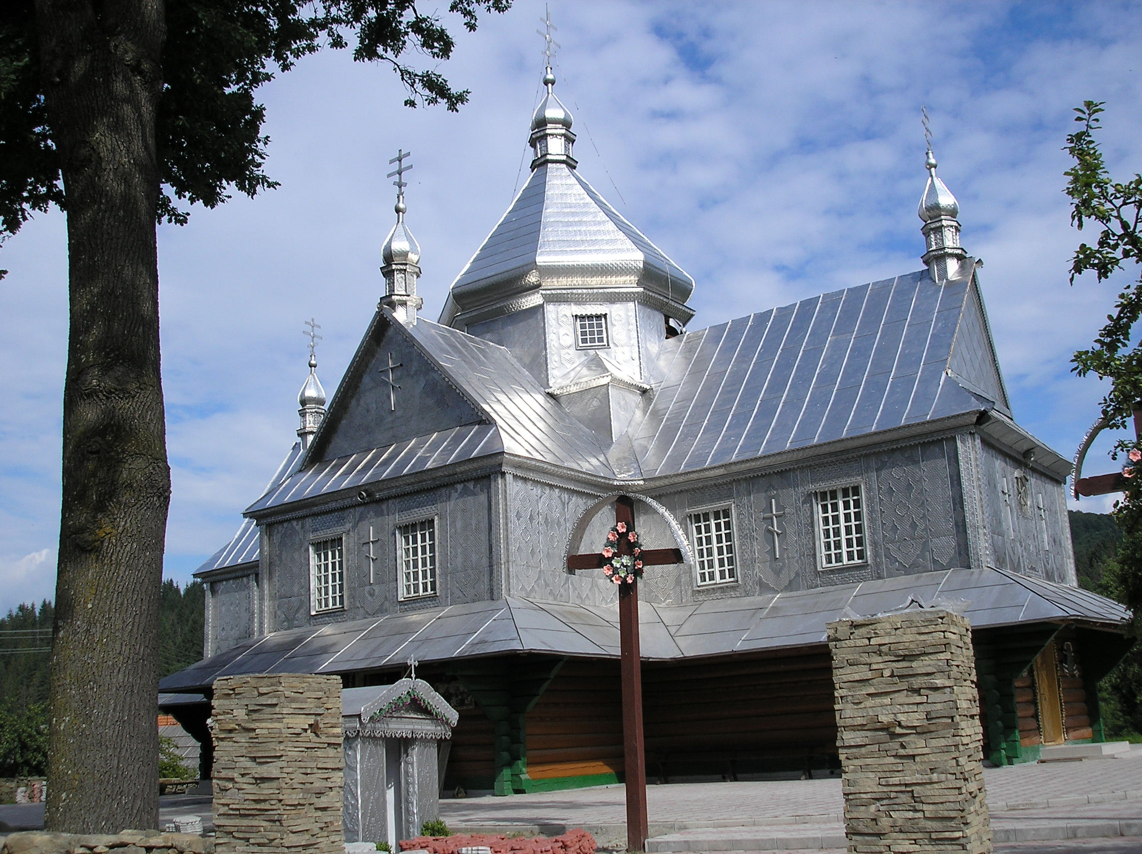 Церква Св. Параскеви (дер.) 1874р. Косівський район с. Шешори